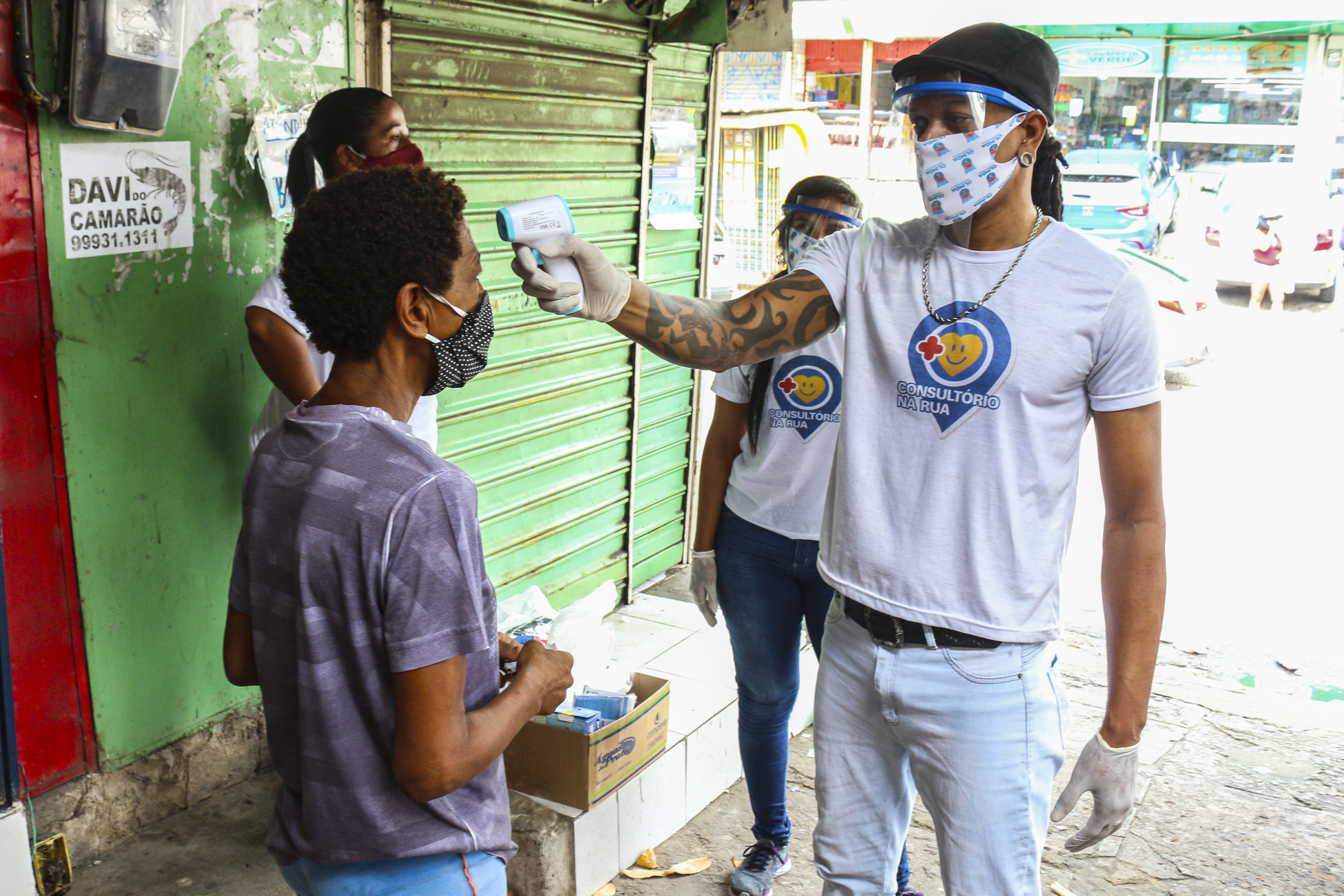 Foto: Alice Mafra